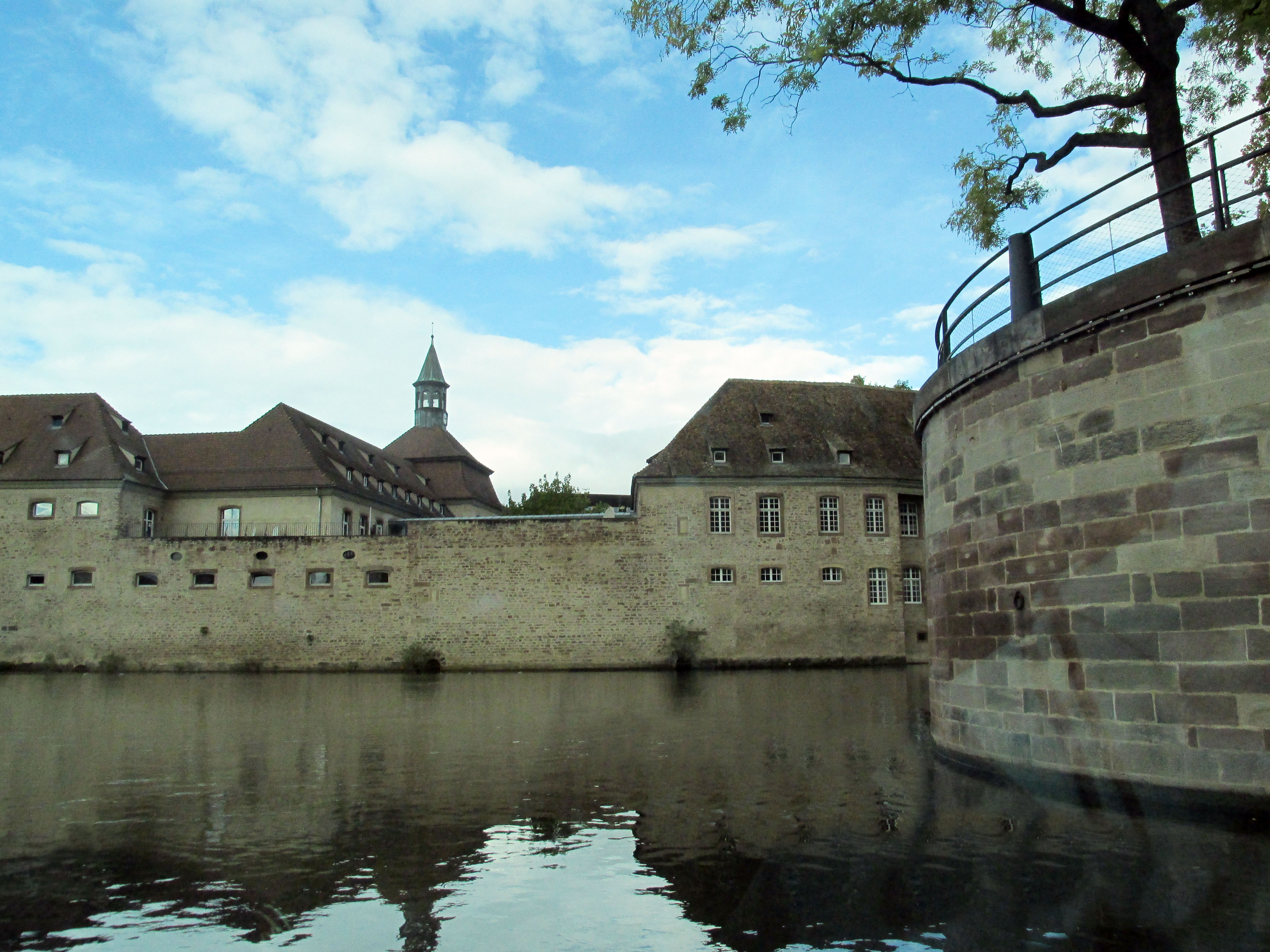 École Nationale d’Administration - ENA - Nationale Hochschule für Verwaltung